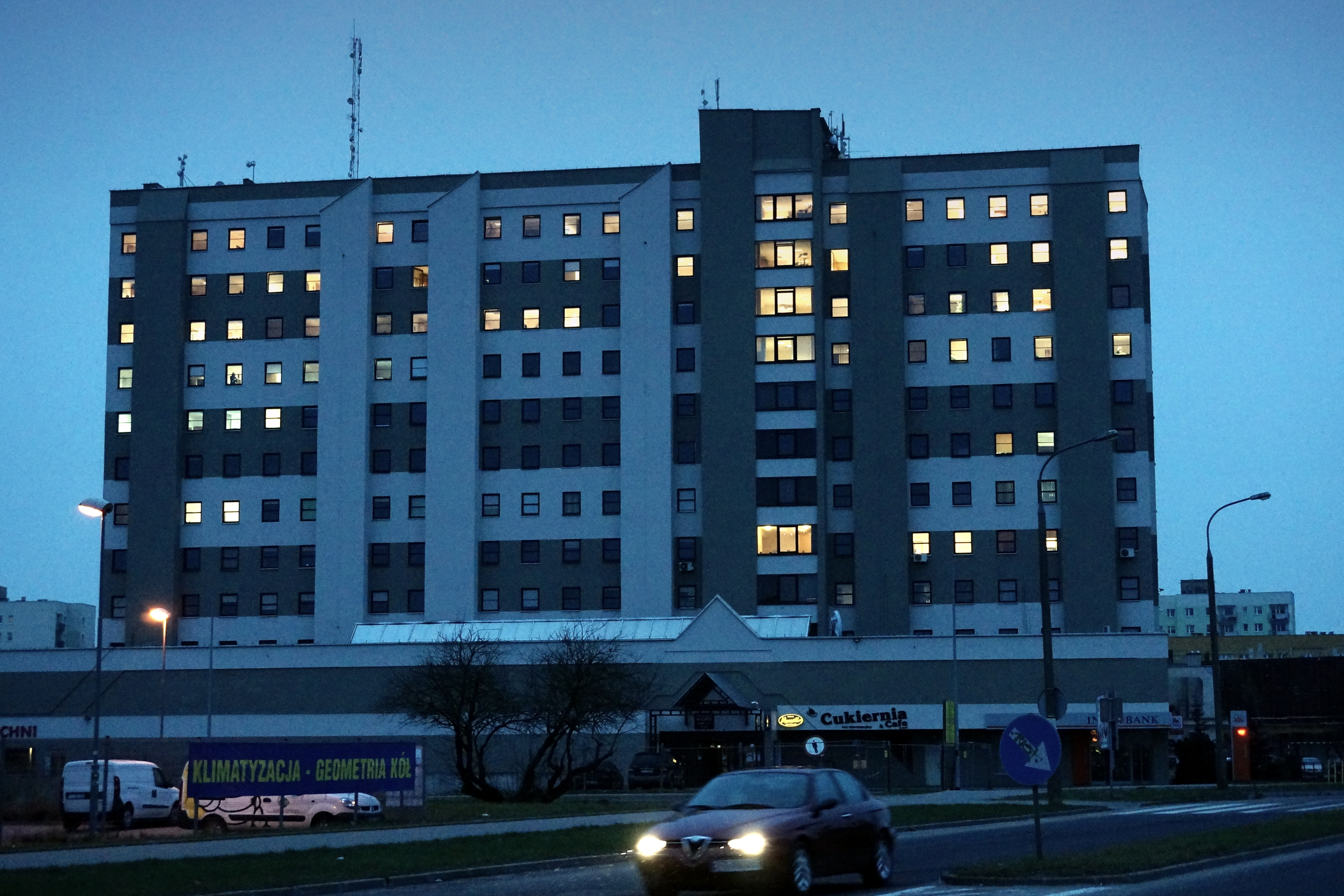 Gorzów Wlkp., dzielnica Górczyn. Biurowiec M34 Manhattan Business Center przy ul. Kombatantów 34, określany zwyczajowo " Watral ".